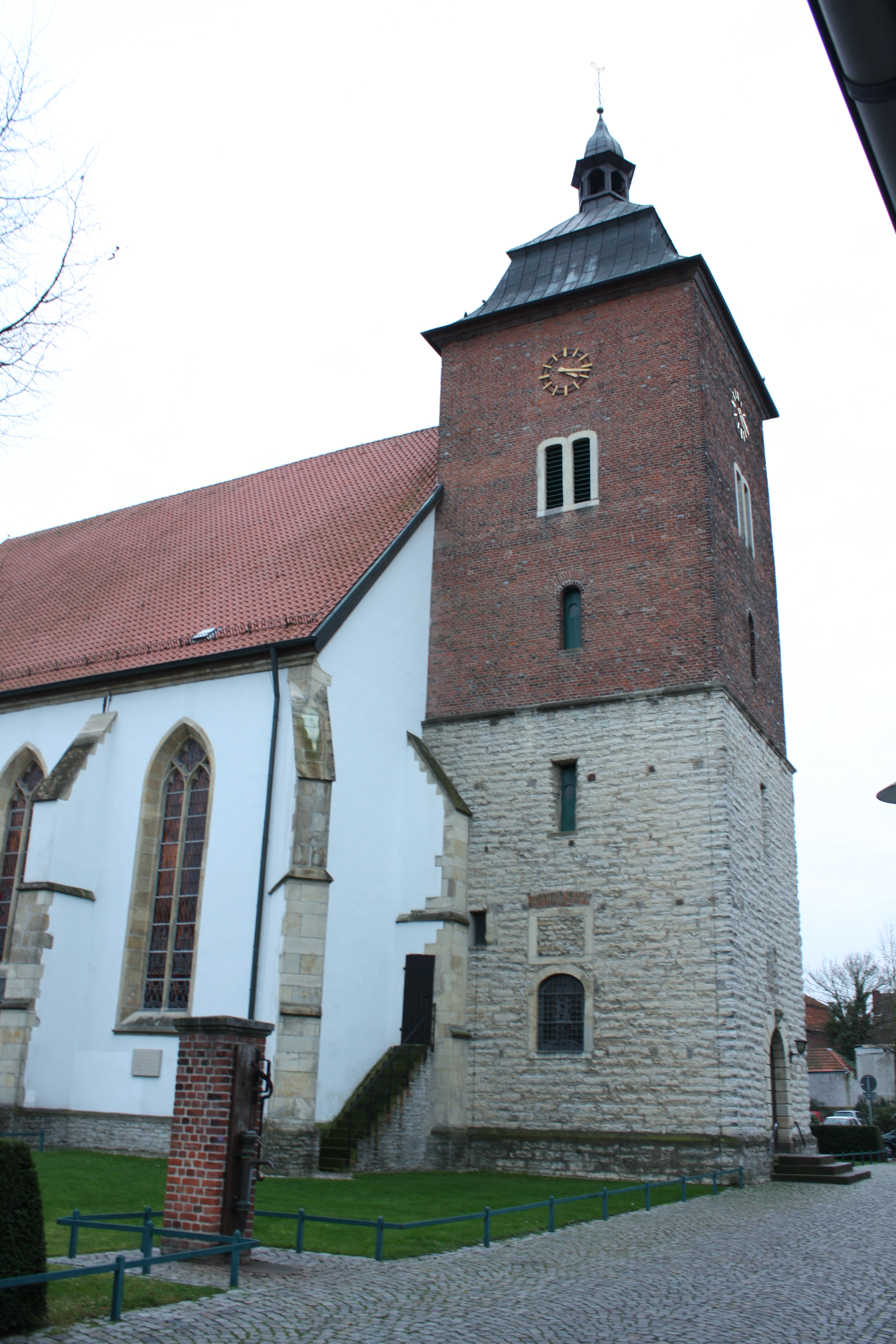 St. Nikolaus in Münster-Wolbeck